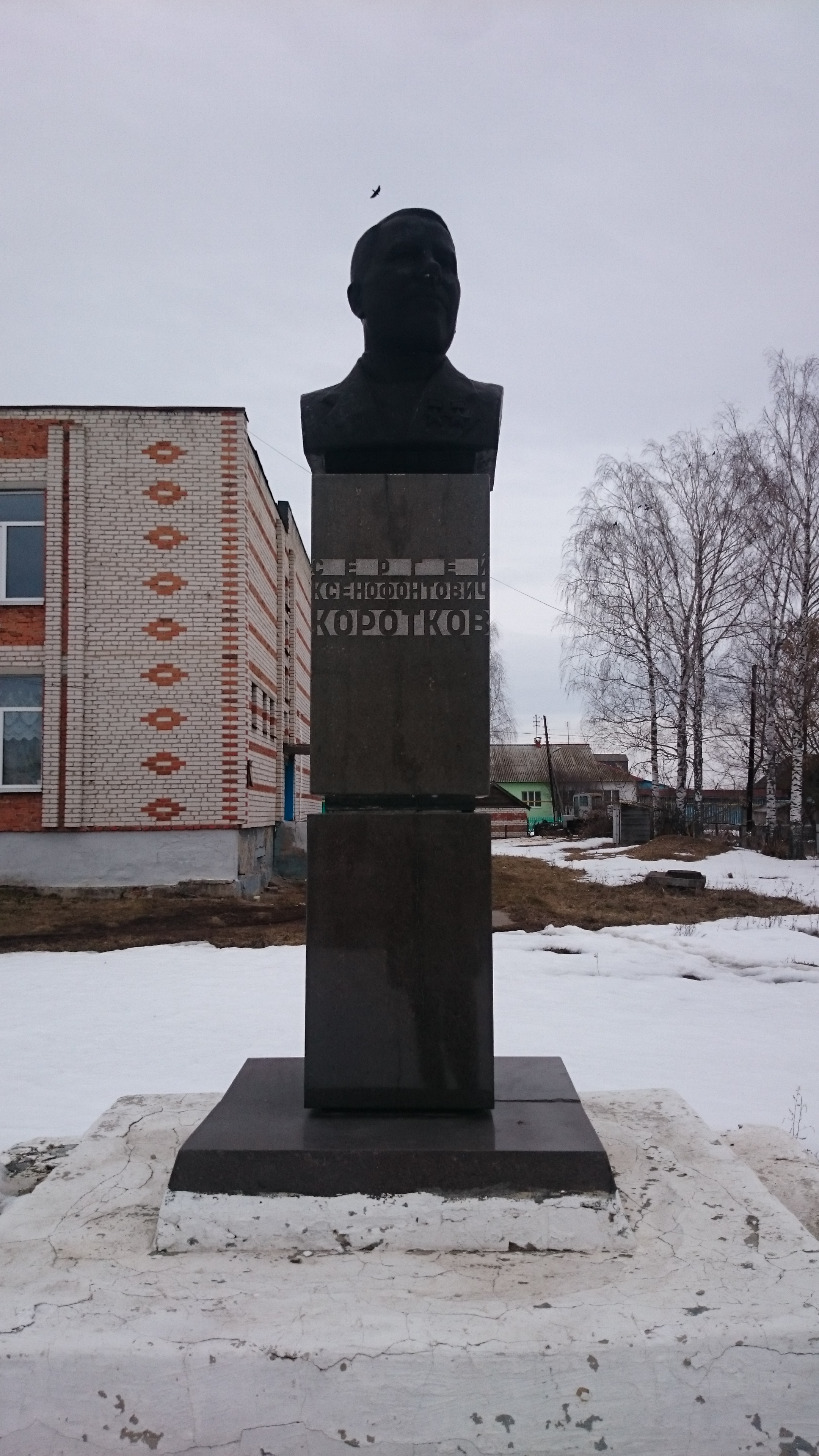 Коротков Сергей Ксенофонтович